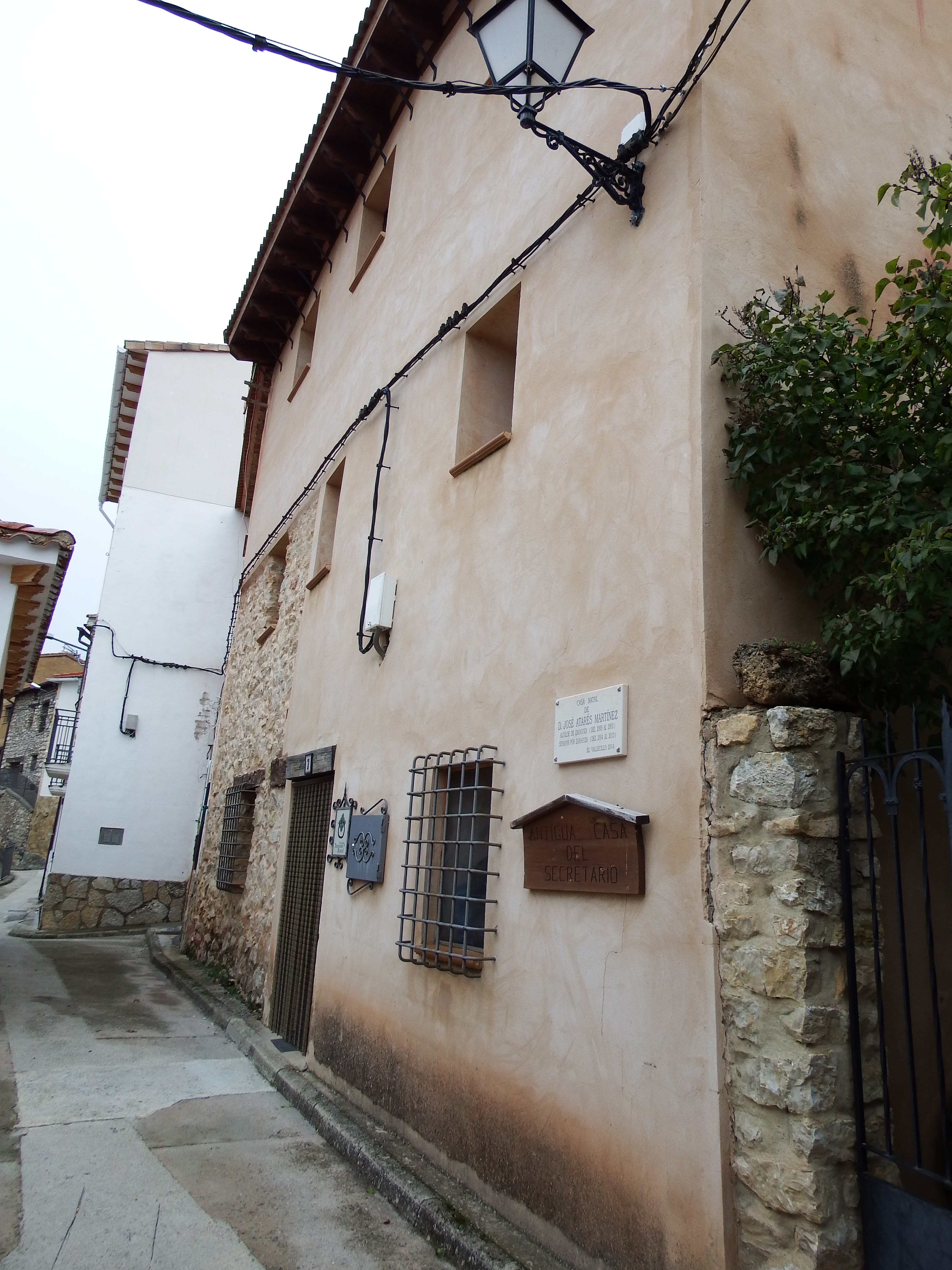 El Vallecillo